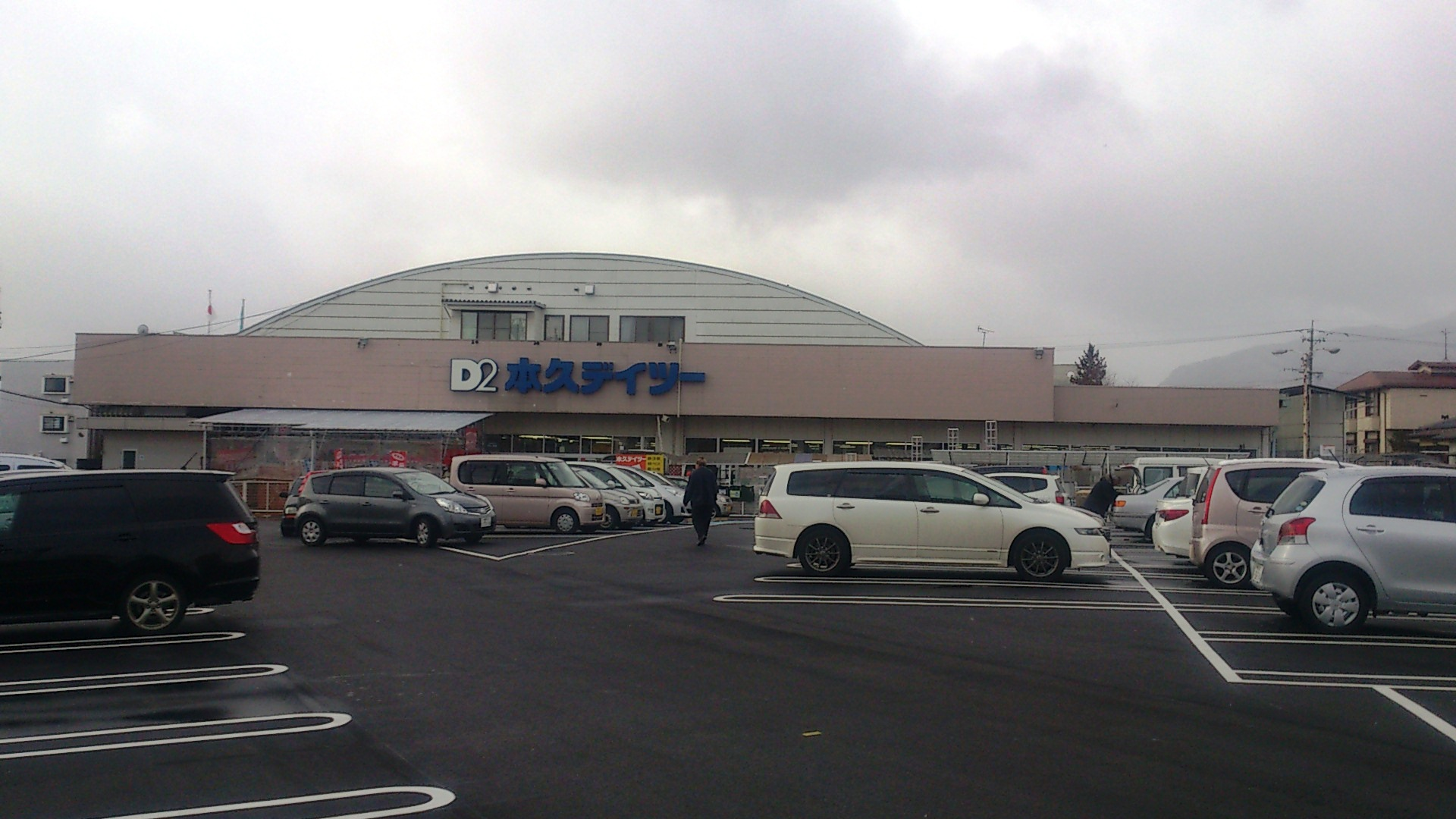 本久デイツー北長野通り店（長野県長野市桐原一丁目）